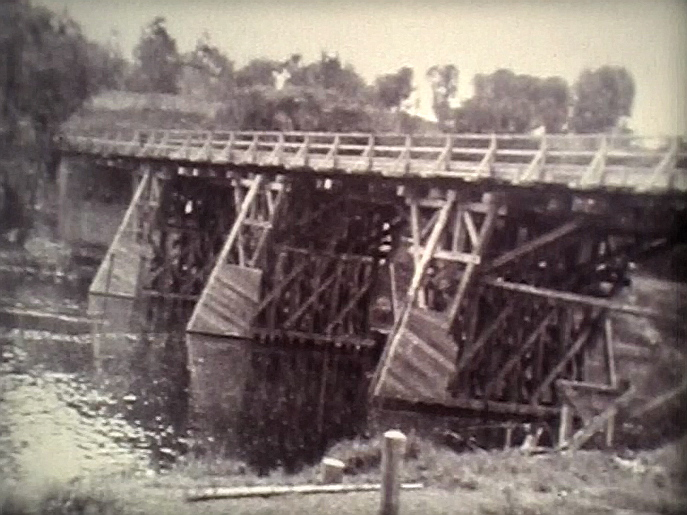 Brücke über die Saar und den Saarkanal, verbindet die Orte Kleinblittersdorf und Grosbliederstroff, Behelfsbrücke während der Kriegsjahre 1940-1944 aus Holz.